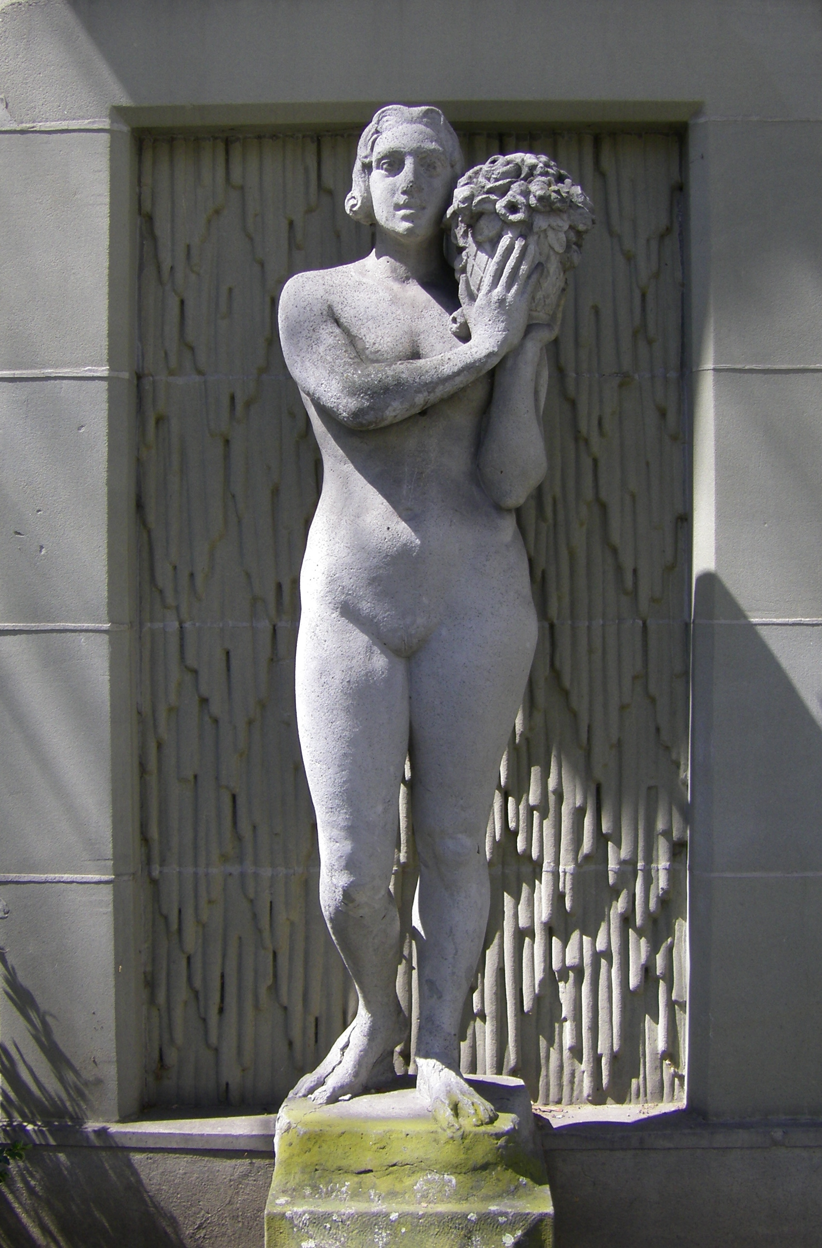 Flora-Statue von 1930 von Karl Hänny (1879-1972) vor der Ostfassade des Transformatorenhäuschens an der Schwarztorstrasse 62, Bern, Schweiz.